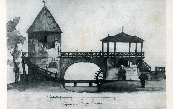 Пиль-вежа, Павловськ: проект паркового павільйона